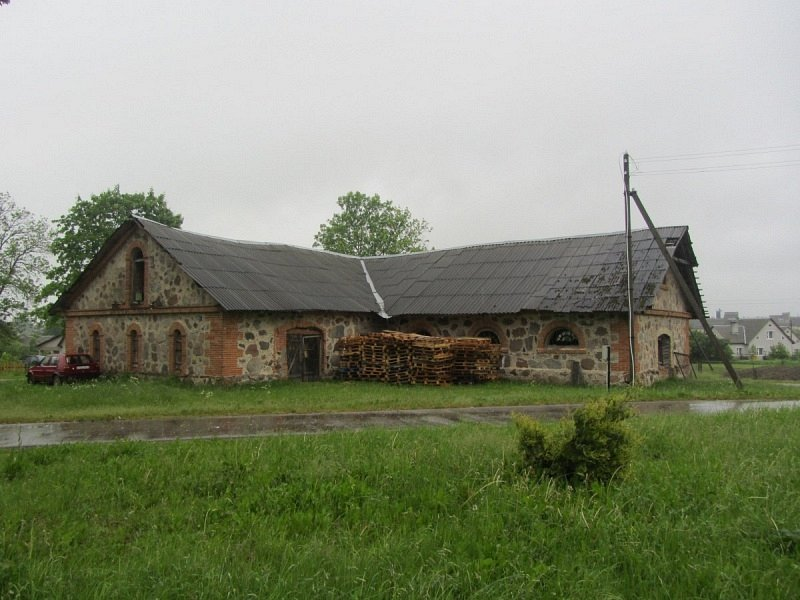 Трокенікі 1. Сядзіба. Стайня-вазоўня